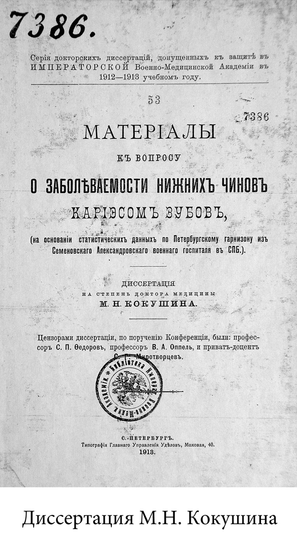 Диссертация